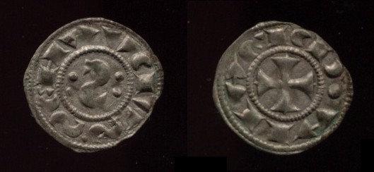 Siena (XII secolo) denaro - denier